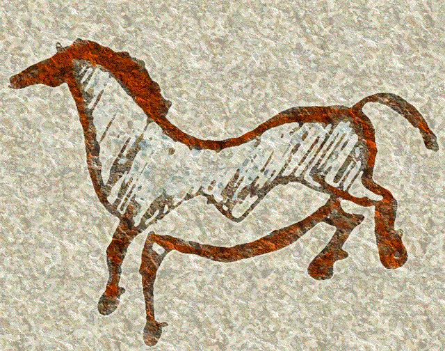 Ejemplo genérico de caballo pintado paleolítico según las características típicas del estilo III de Leroi-Gourhan: obsérvese la microcefalia y el vientre abombado típicos de este periodo